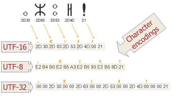 байтов масив към низ в Java